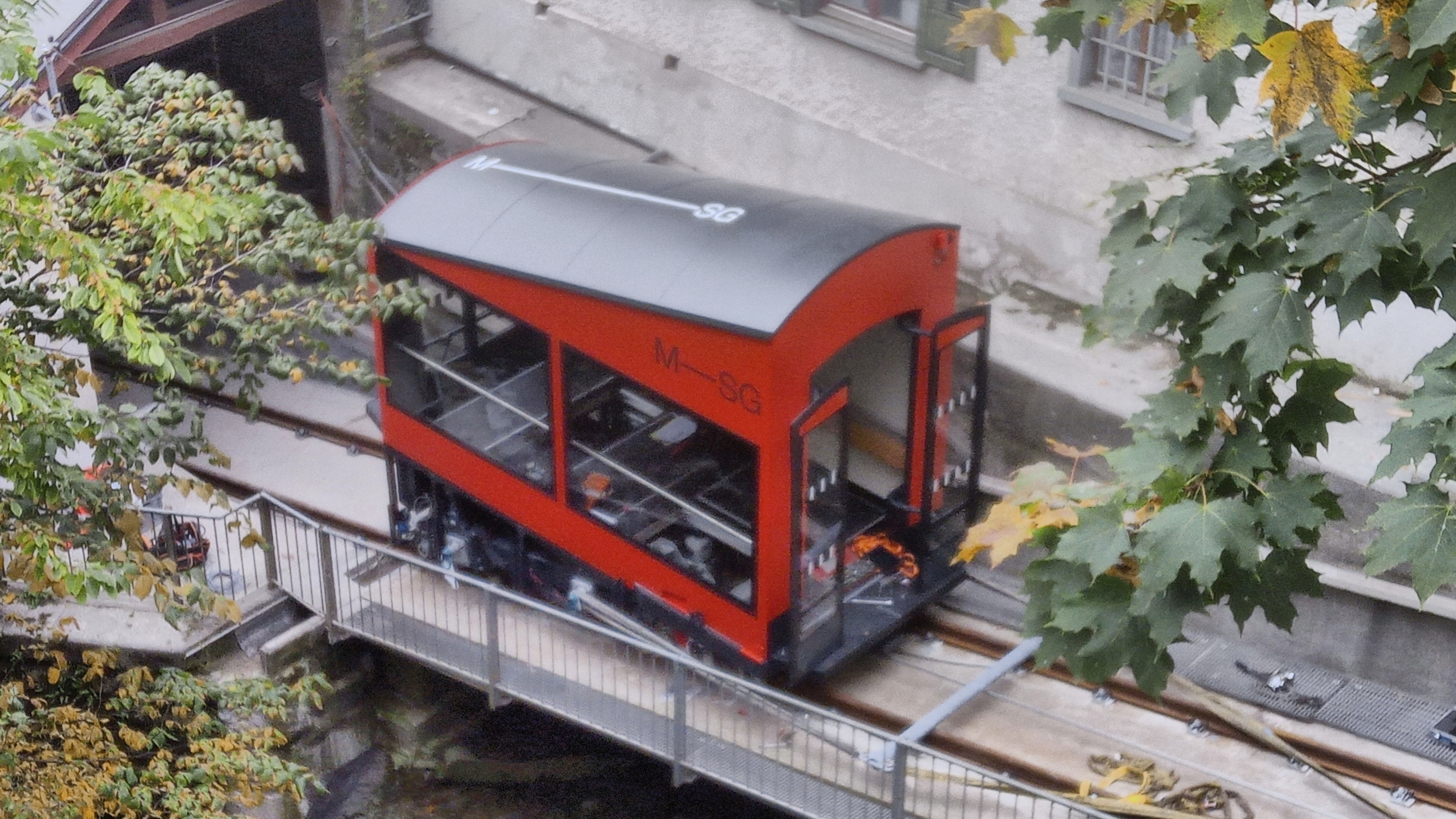 Die Kabine der Mühleggbahn am Tag ihrer Einsetzung in die Schienen der renovierten Mühleggbahnstrecke. Es werden an ihr noch Einstellungsarbeiten vorgenommen